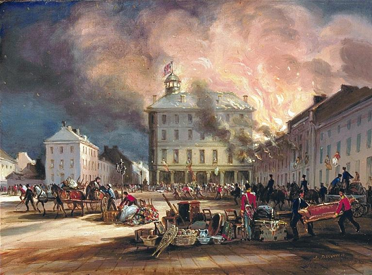 Burning of Hayes House, Dalhousie Square, Montreallabel QS:Len,"Burning of Hayes House, Dalhousie Square, Montreal"label QS:Lfr,"Incendie de la maison Hayes, square Dalhousie, Montréal"